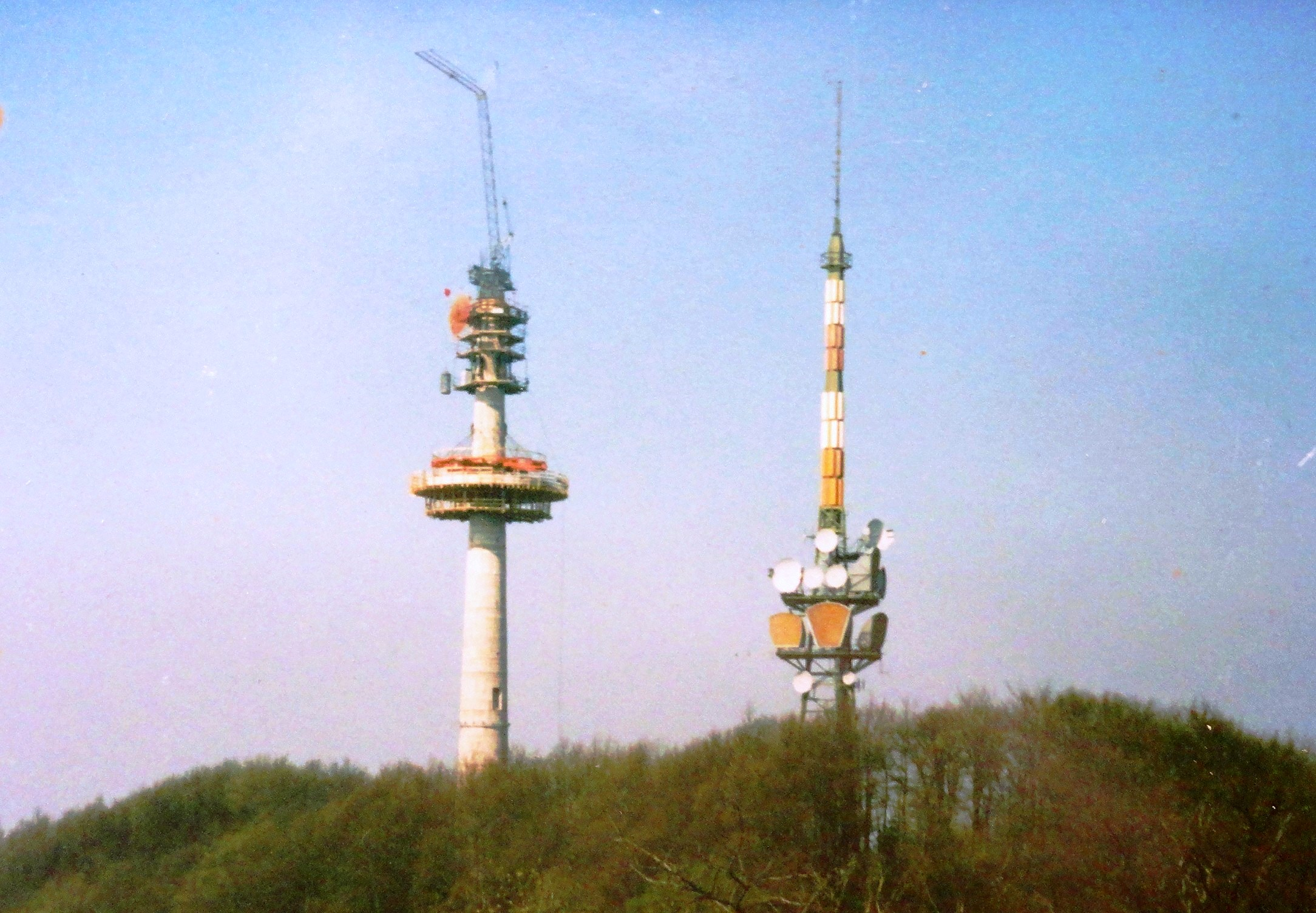 Sender Vogtsburg mit alten und neuen Sendeturm